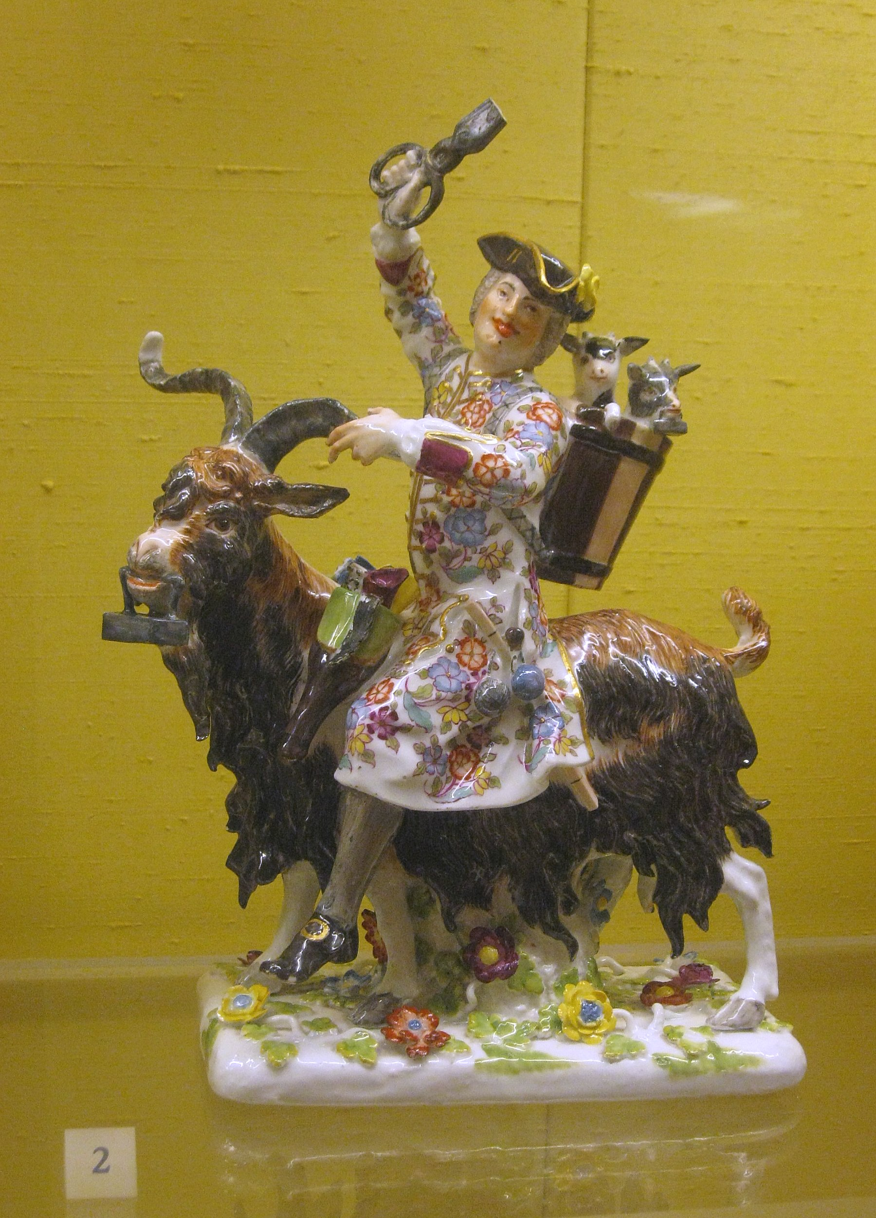 Schneider auf dem Ziegenbock, Johann Joachim Kändler, 1740, Meißener Porzellanmuseum im Schloss Lustheim, Oberschleißheim